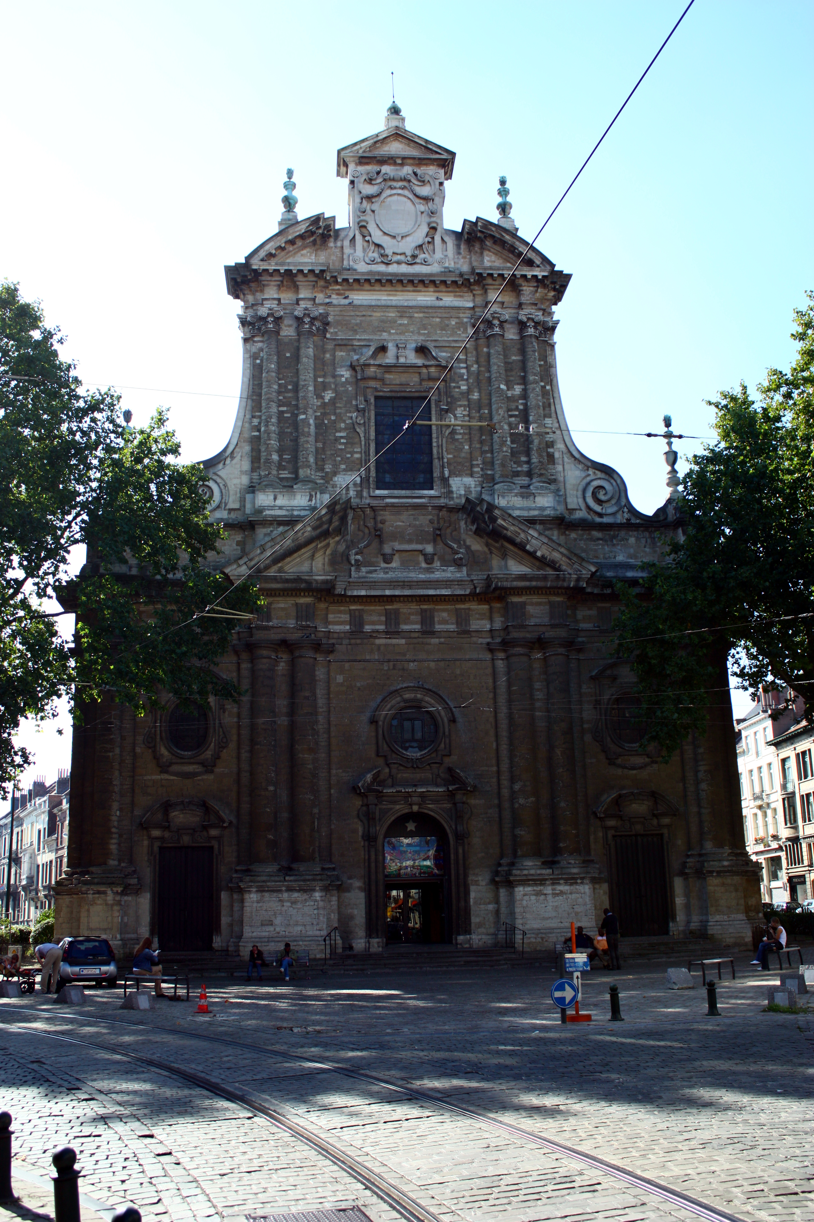 Église de la Sainte-Trinité. Monument classé n°2071-0003/0